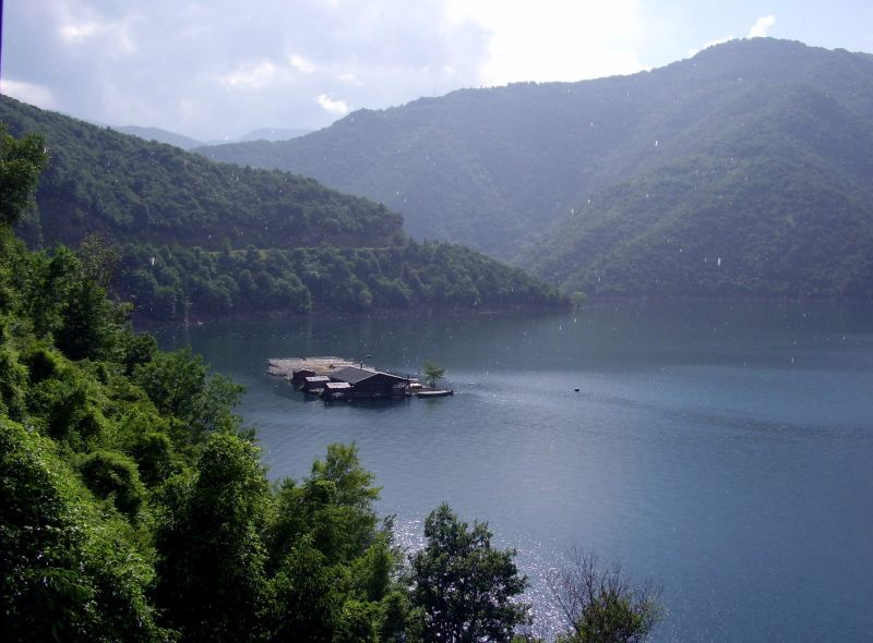 Язовир Въча